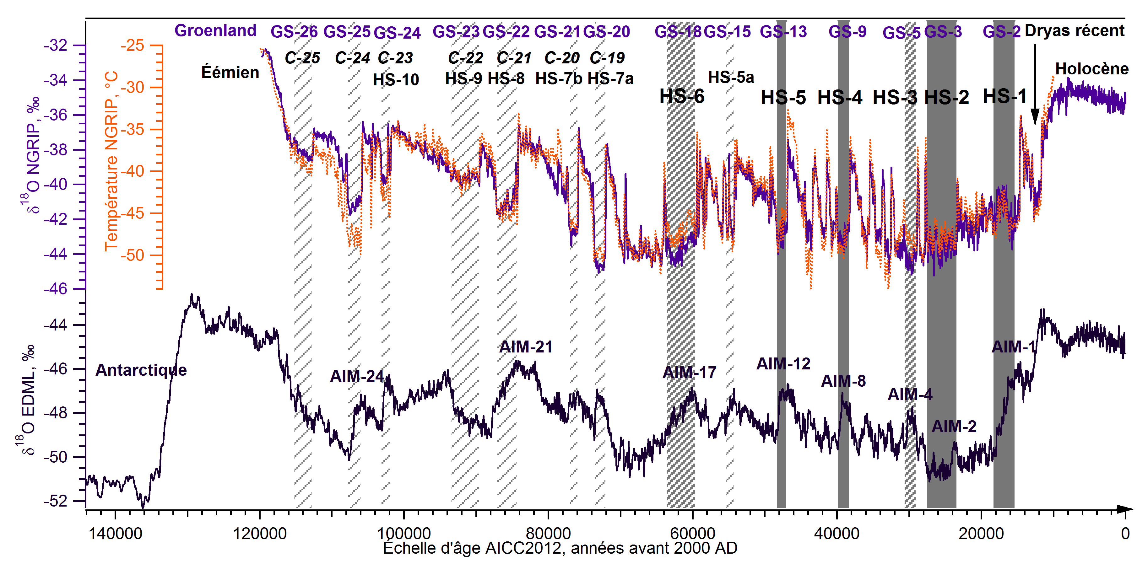 Chronologie (temps de gauche à droite) des événements climatiques majeurs de la dernière période glaciaire enregistrés dans les carottes de glace polaires et position relative approximative des événements de Heinrich, intialement enregistrés dans les carottes de sédiment marin de l'Océan Atlantique Nord.